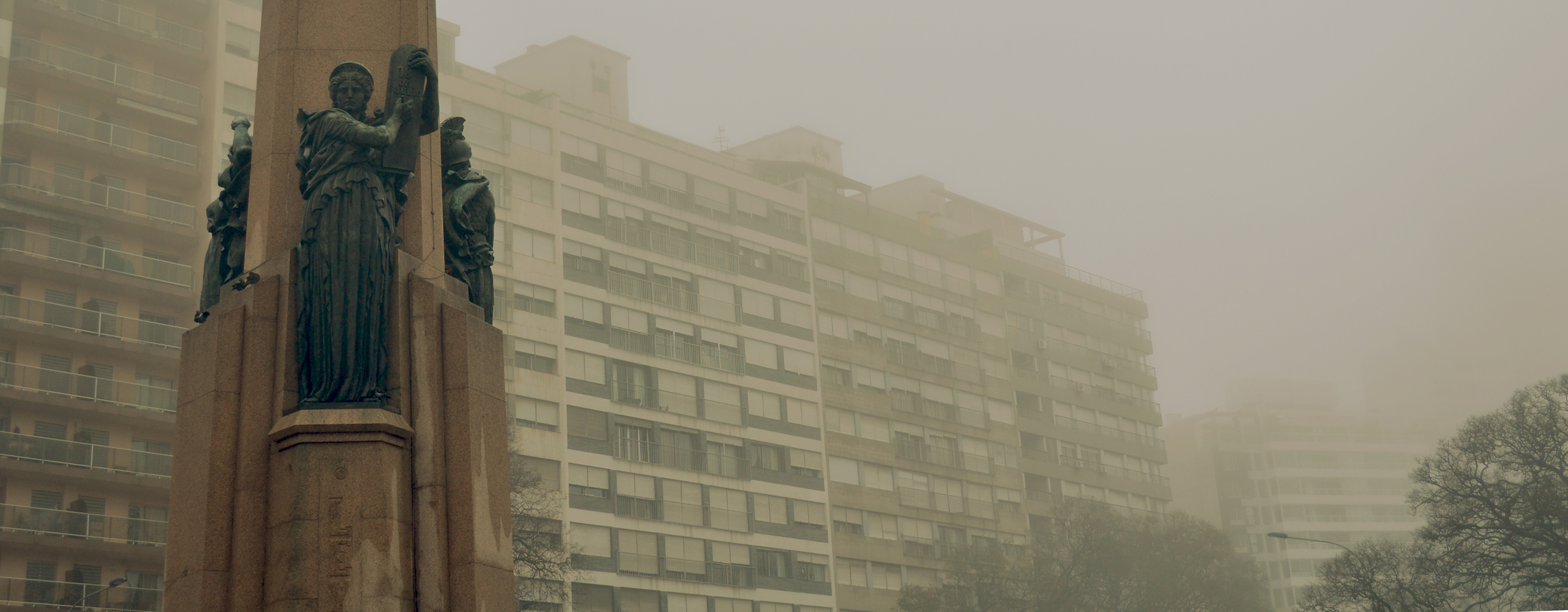 Obelisco a los Constituyentes de 1830. Ubicada en el departamento de Montevideo